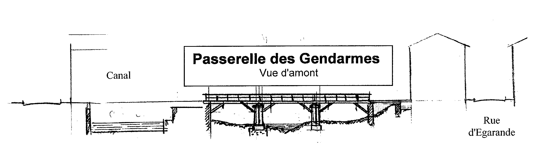 Croquis de la Passerelles des Gendarmes